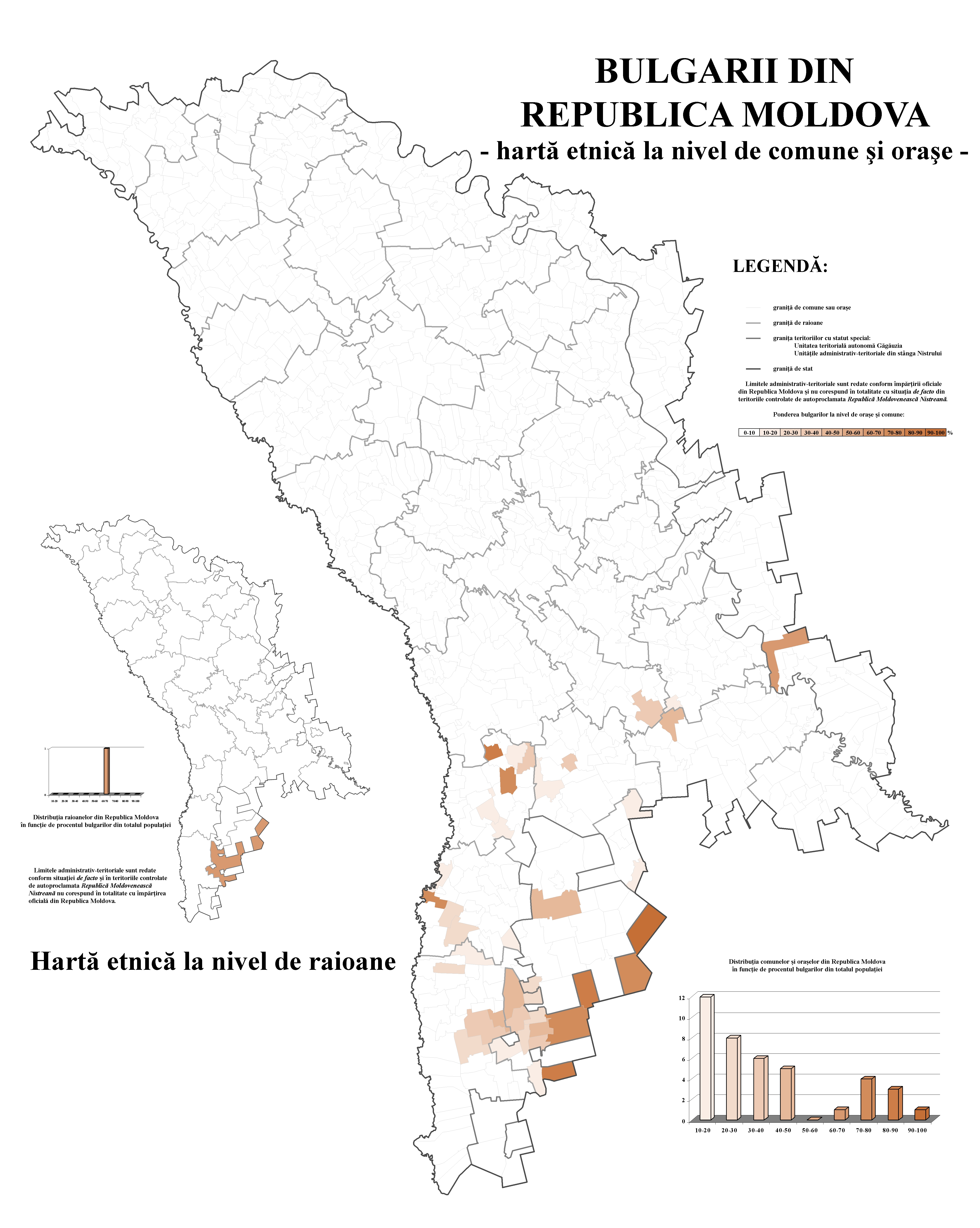 Ponderea bulgarilor în Republica Moldova la nivel de comune conform datelor recensământului din 2004